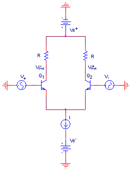 מגבר הפרש במימוש בעזרת טרנזיסטורים ביפולריים